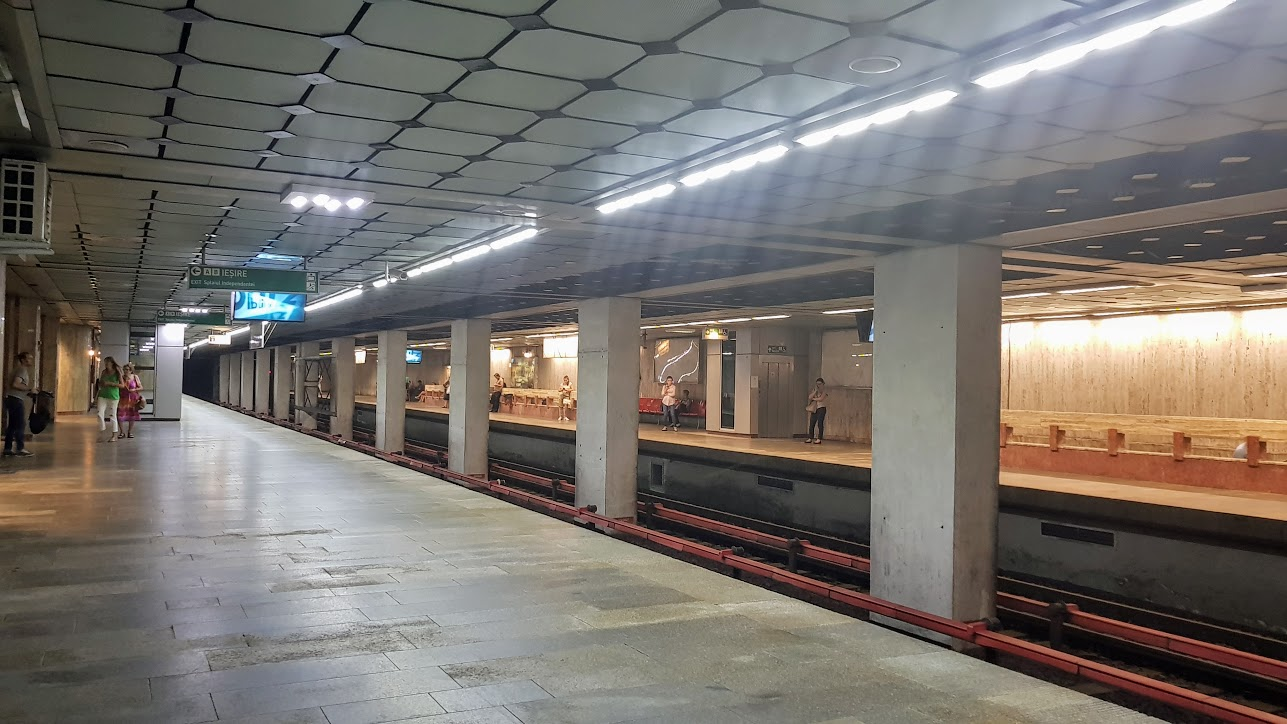 Stația de metrou Izvor, București, 2017.